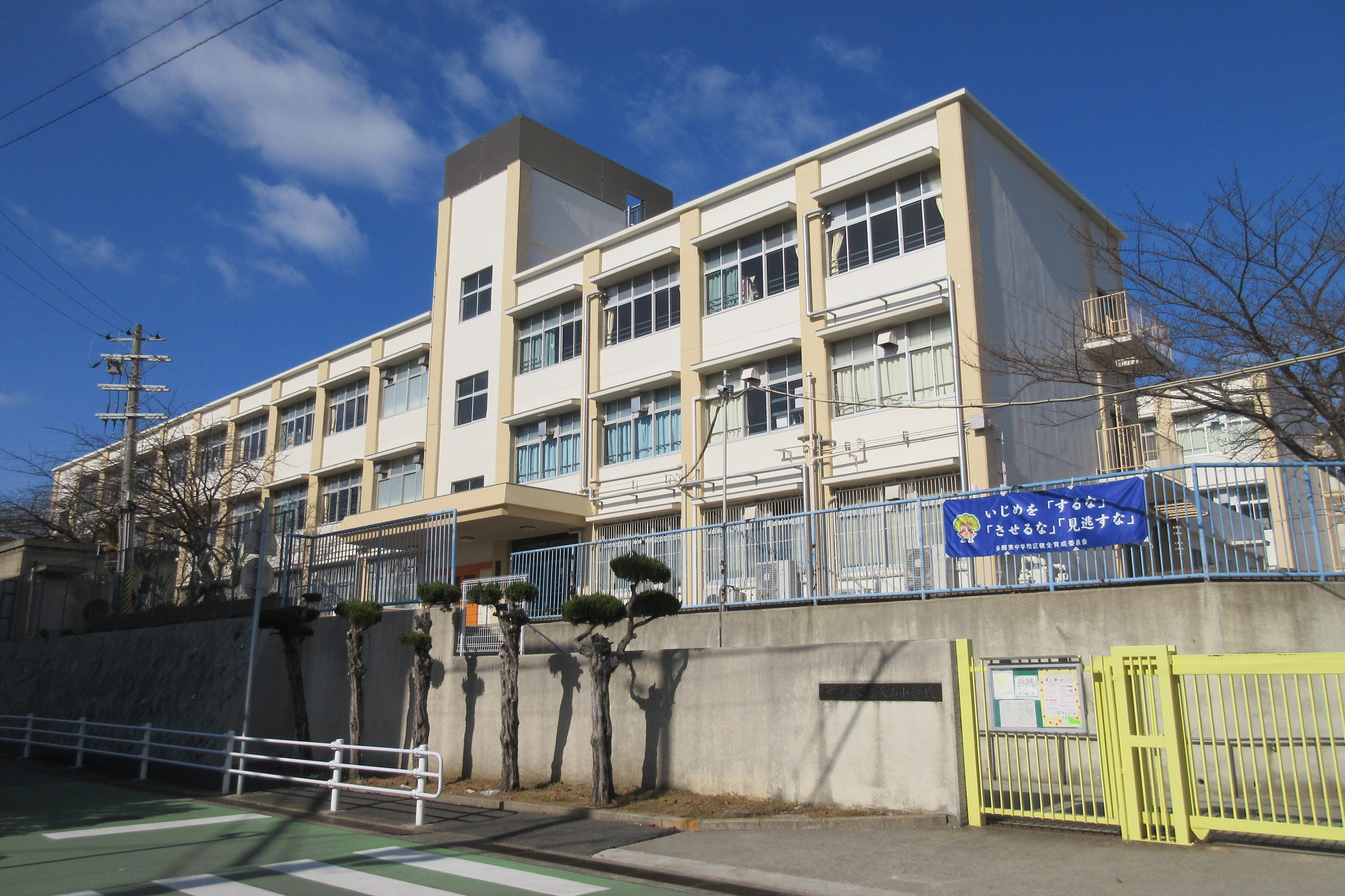 神戸市立小束山小学校